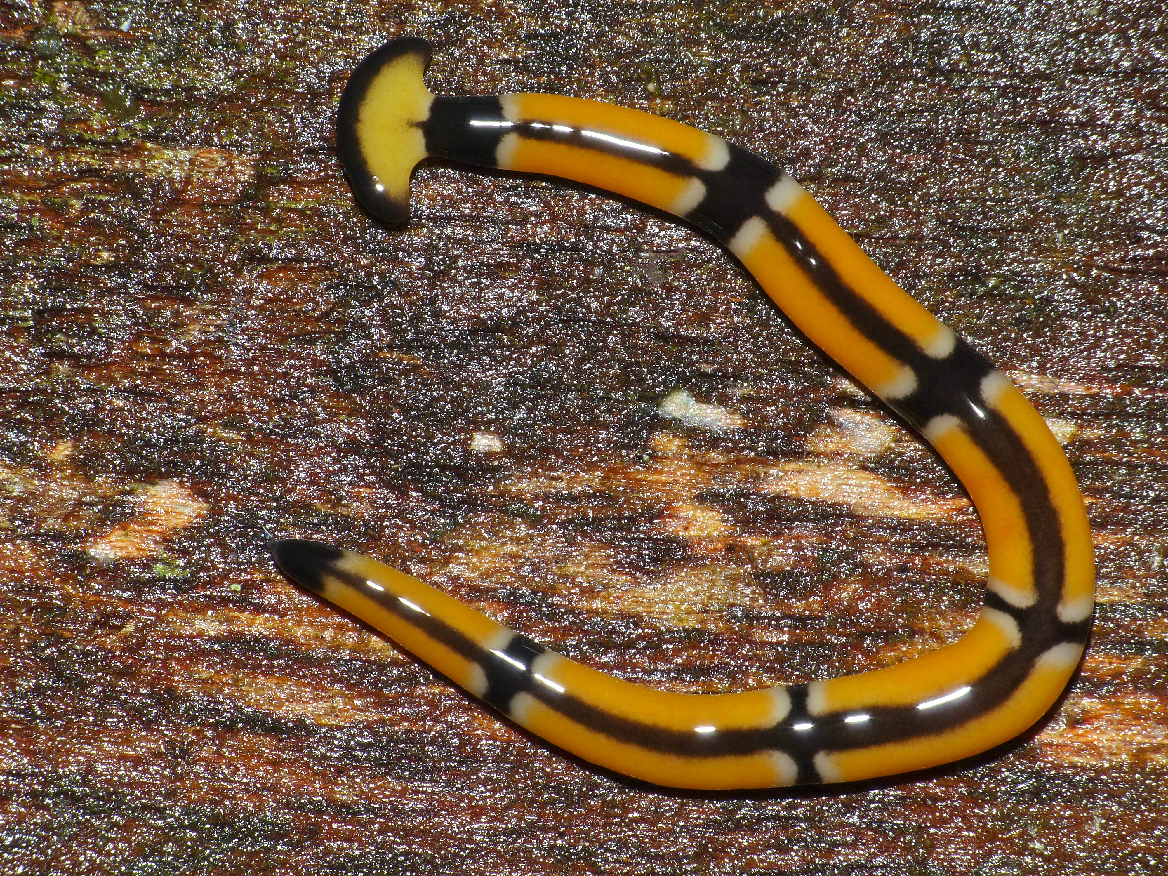 Deer Cave Boardwalk, Mulu NP, Sarawak, MALAYSIA